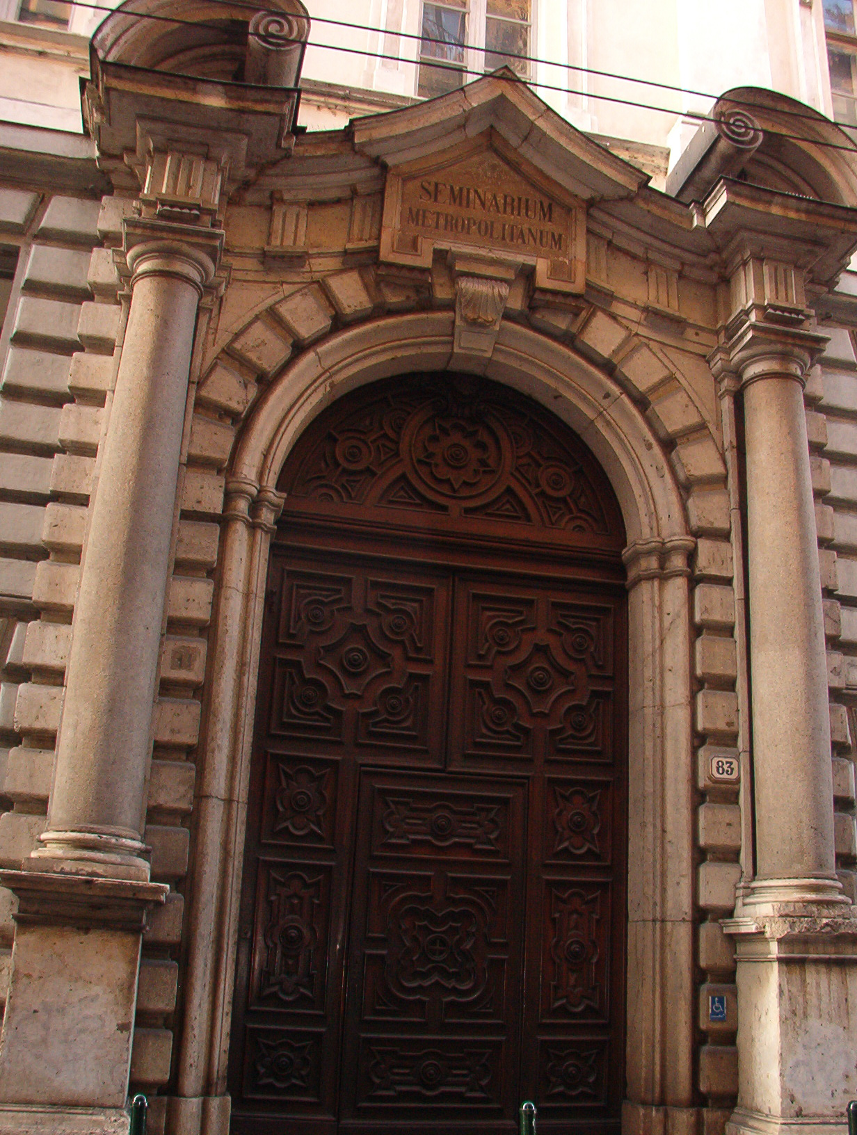 Ingresso del Seminario - Torino - Italy